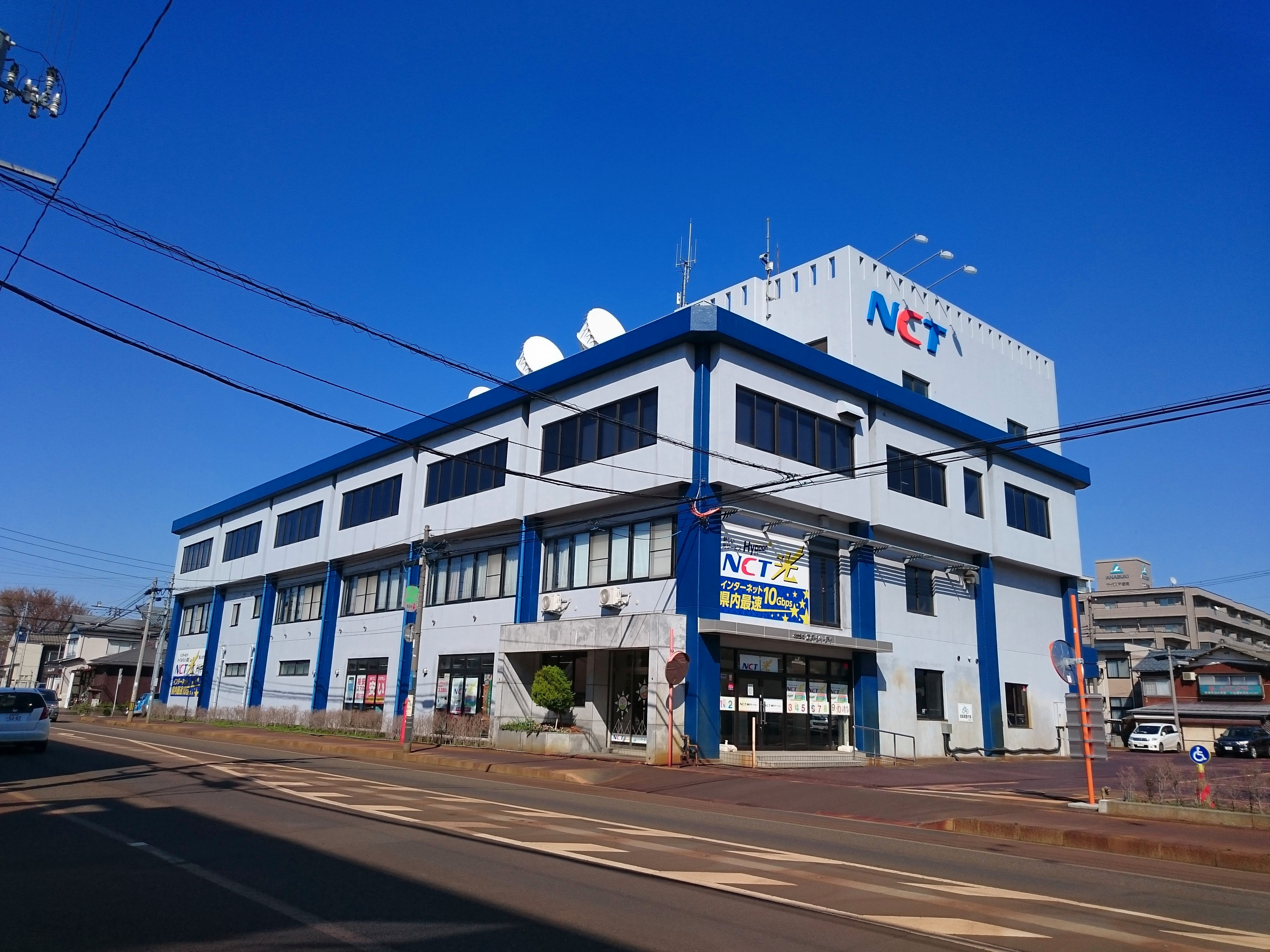 ケーブルテレビのNCTの本社外観